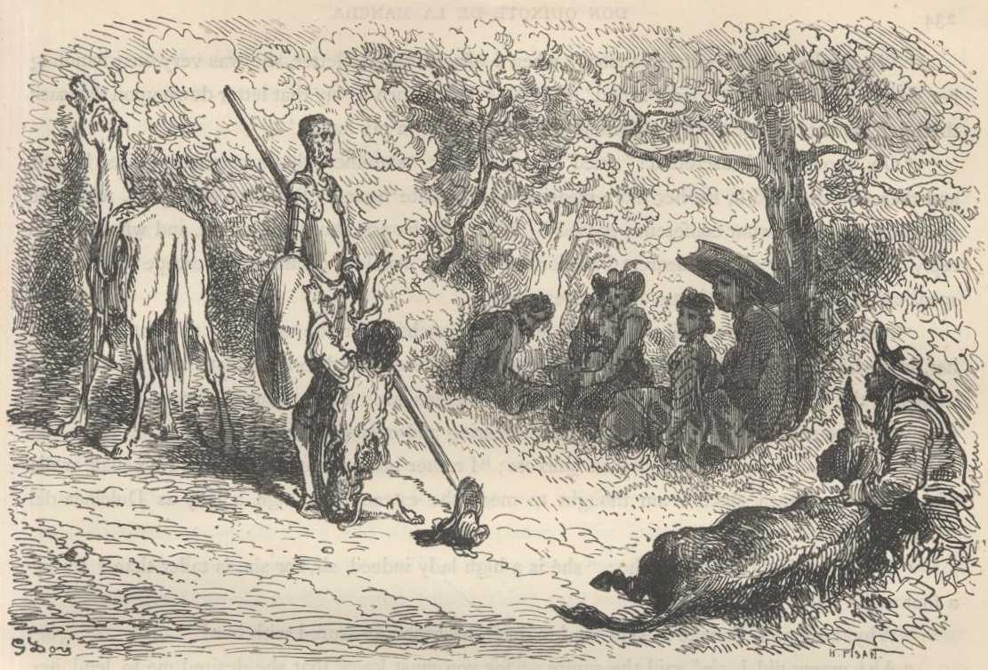 Gustave Doré, ilustração para "Dom Quixote" de Miguel de Cervantes